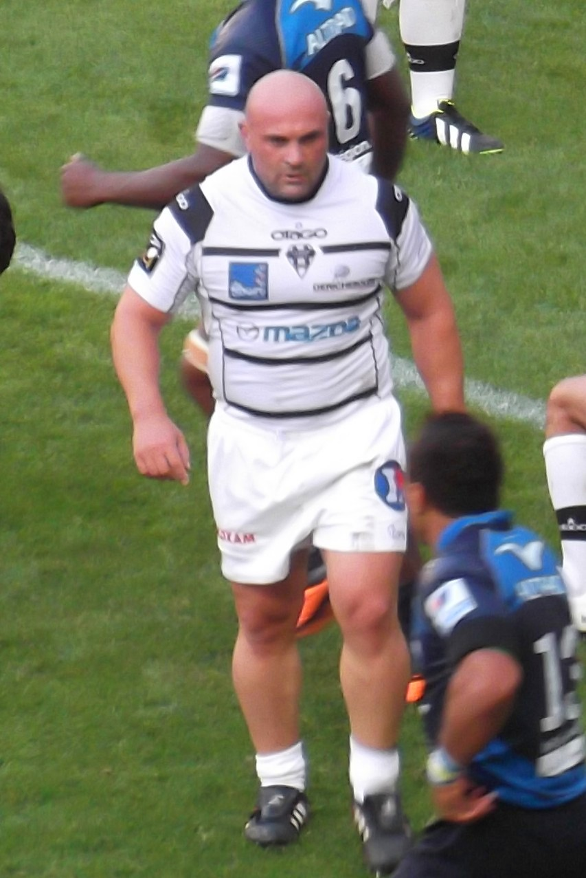 Match MHRC-CA Brive.